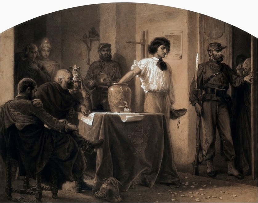 Cykl "Wojna", III. Losowanie rekrutów by Artur Grottger